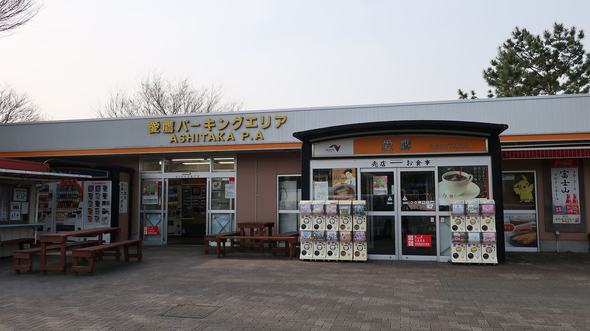 東名高速道路 愛鷹PA